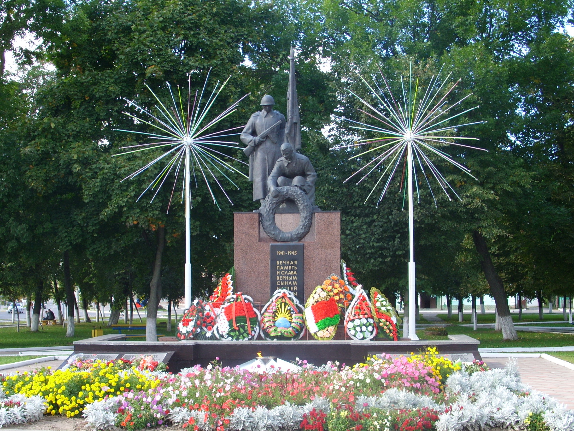 Беларуская (тарашкевіца): Братэрская магіла. г. Ляхавічы This is a photo of Belarusian heritage monument. Reference number: 113Д000472 ( WLM)